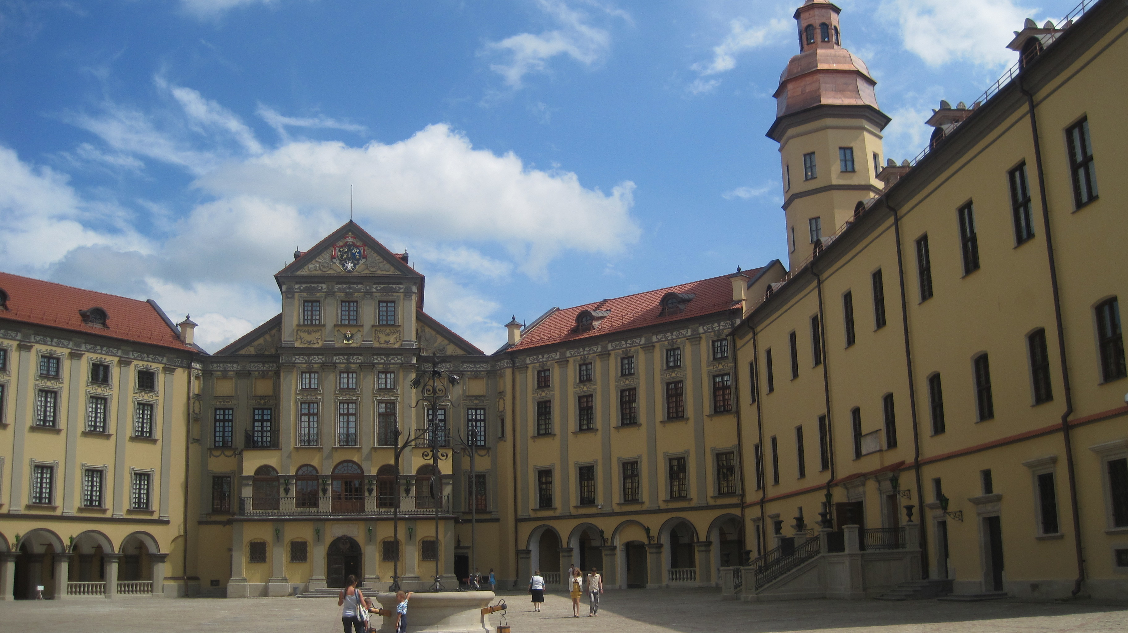 Vue de l'intérieur de la cour du château de Niasvij